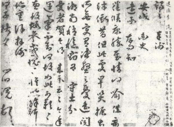 Letter of Toekye Lee Hwang